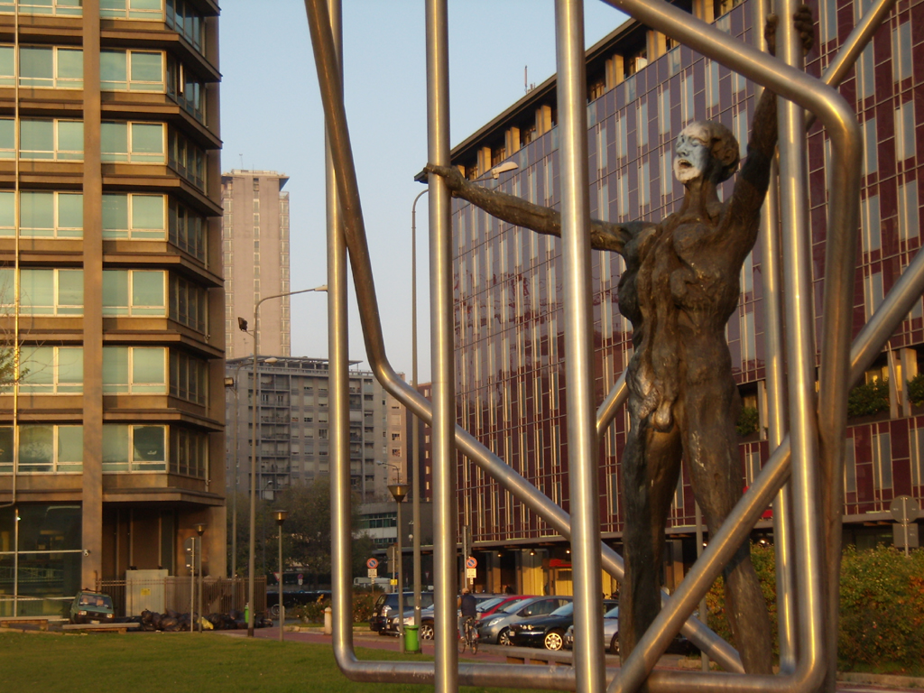 Vista di piazza Einaudi nel centro direzionale di Milano